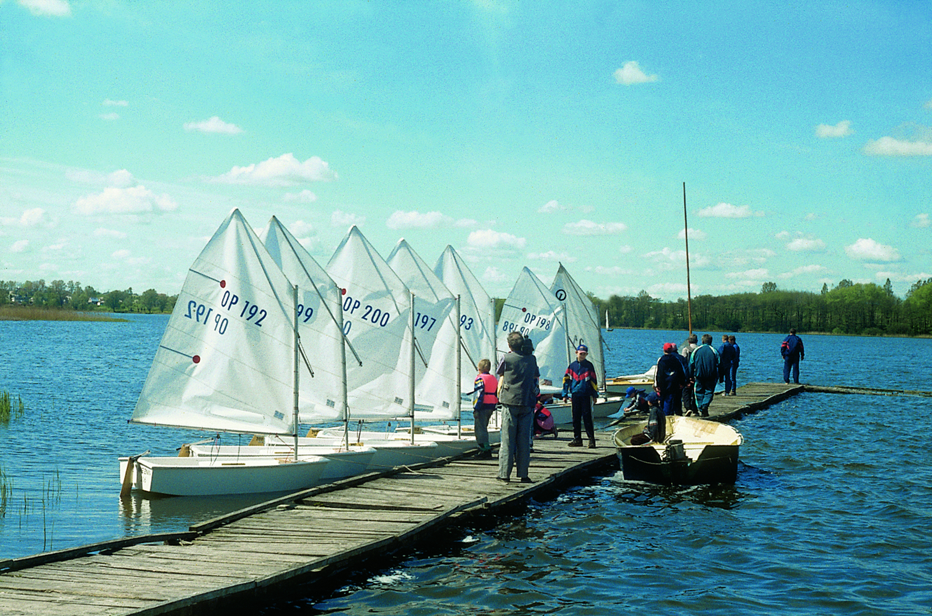 Optymisty UKS MKŻ w Żninie